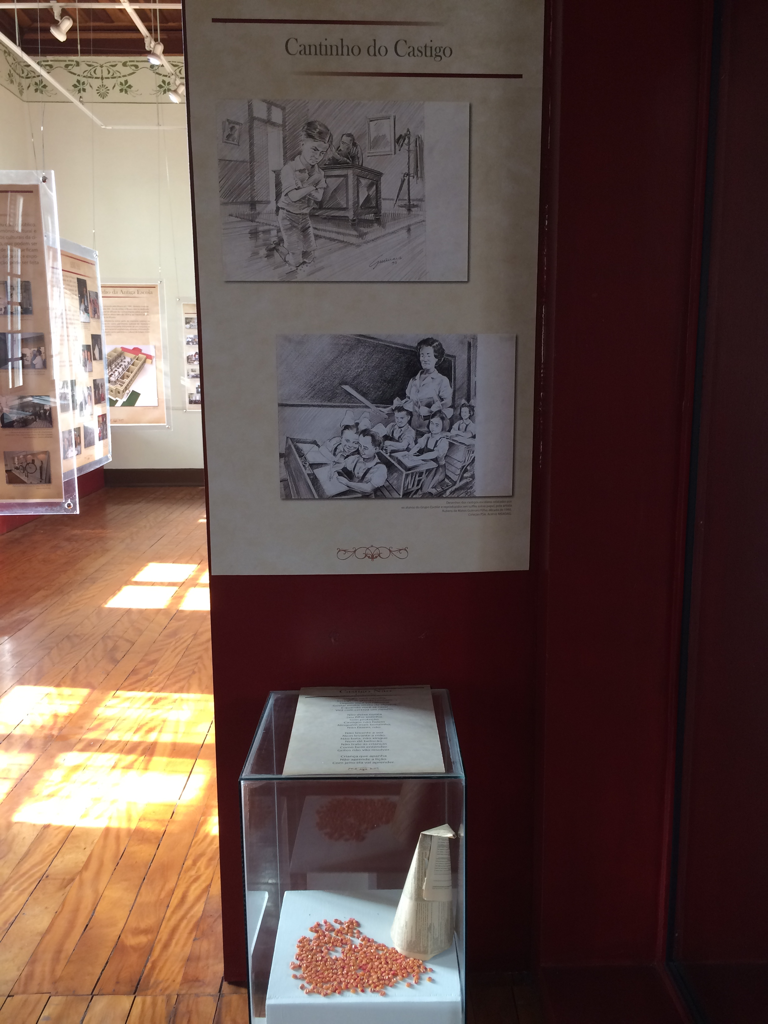 Cantinho do Castigo, do Museu de Santo André Dr. Octaviano Armando Gaiarsa, em Santo André (SP), Brasil.